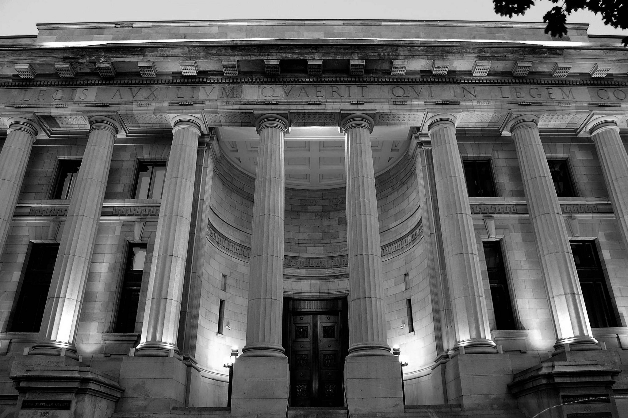 Édifice Ernest Cormier